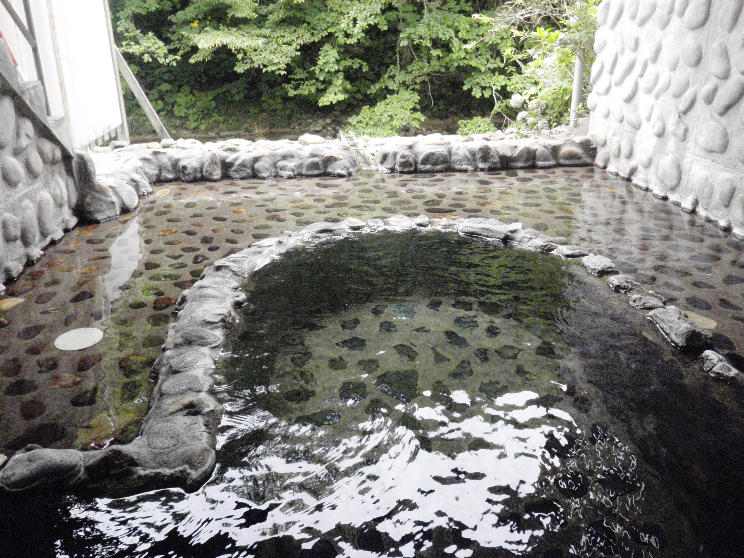 湯野川温泉、濃々園露天風呂